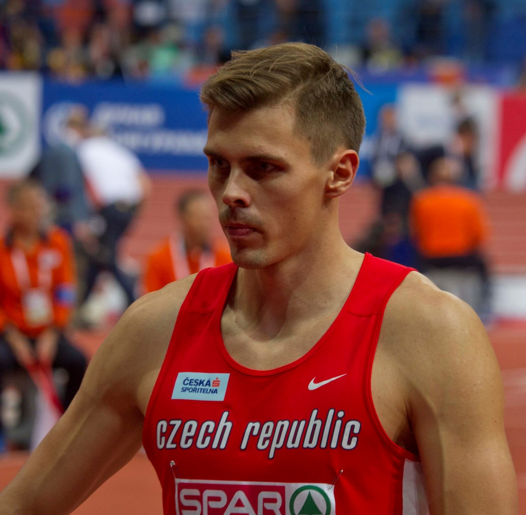 147 hep helcelet